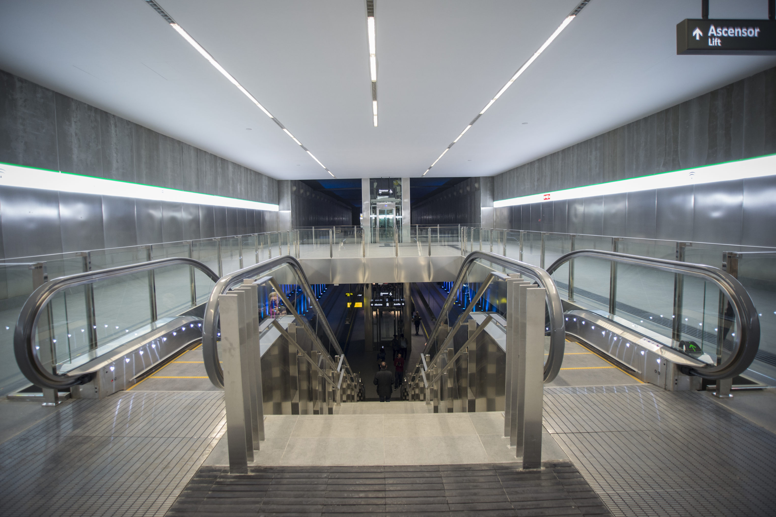 Estación de Recogidas